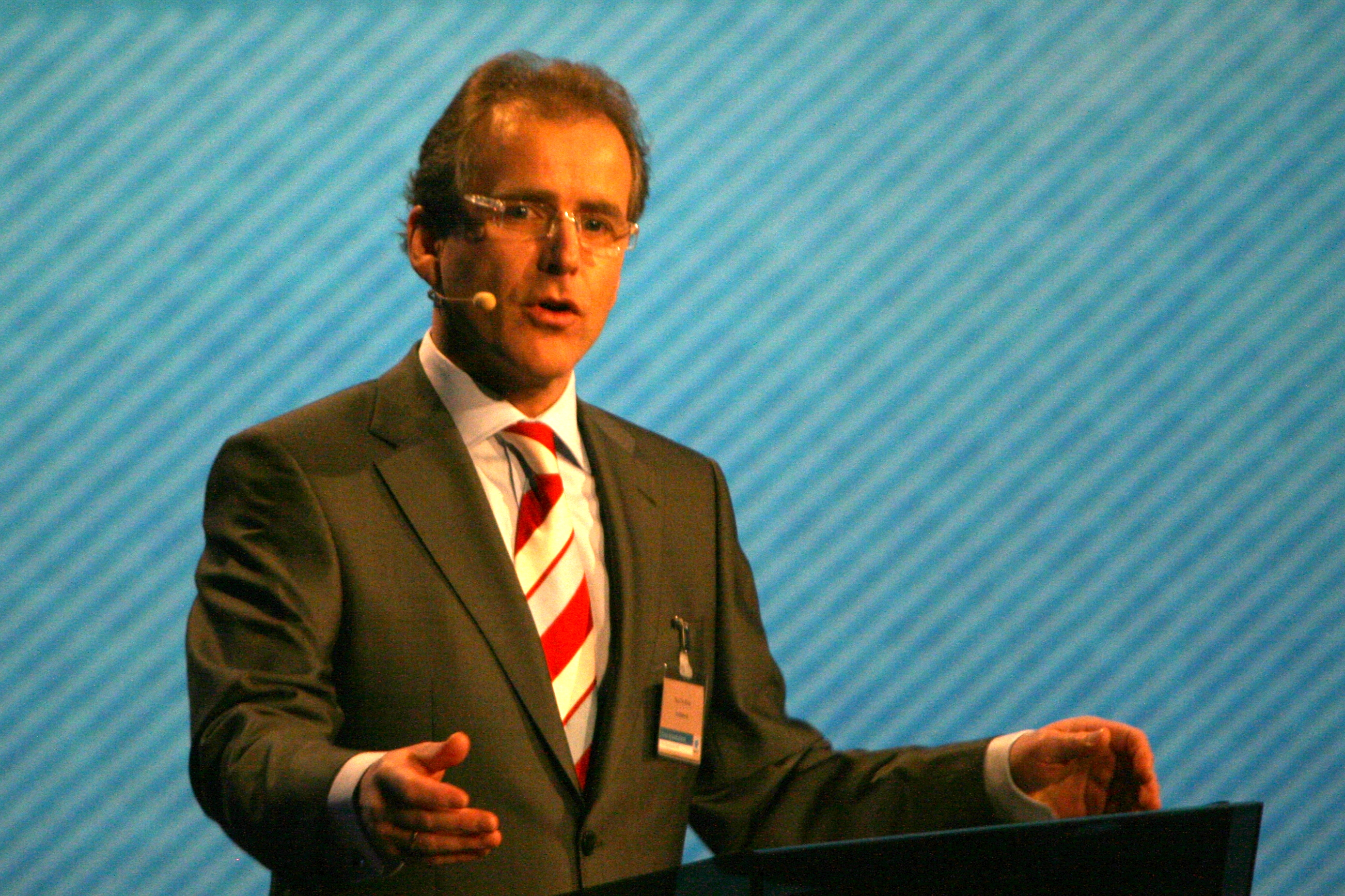 Paul-Christian Rieber, næringslivsleder og NHO-president. Fra NHOs Årskonferanse 2009.